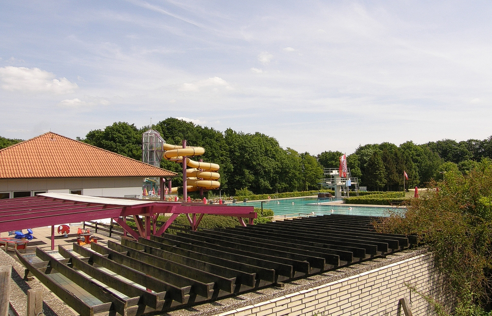 Das Wingster Freibad im Frühling